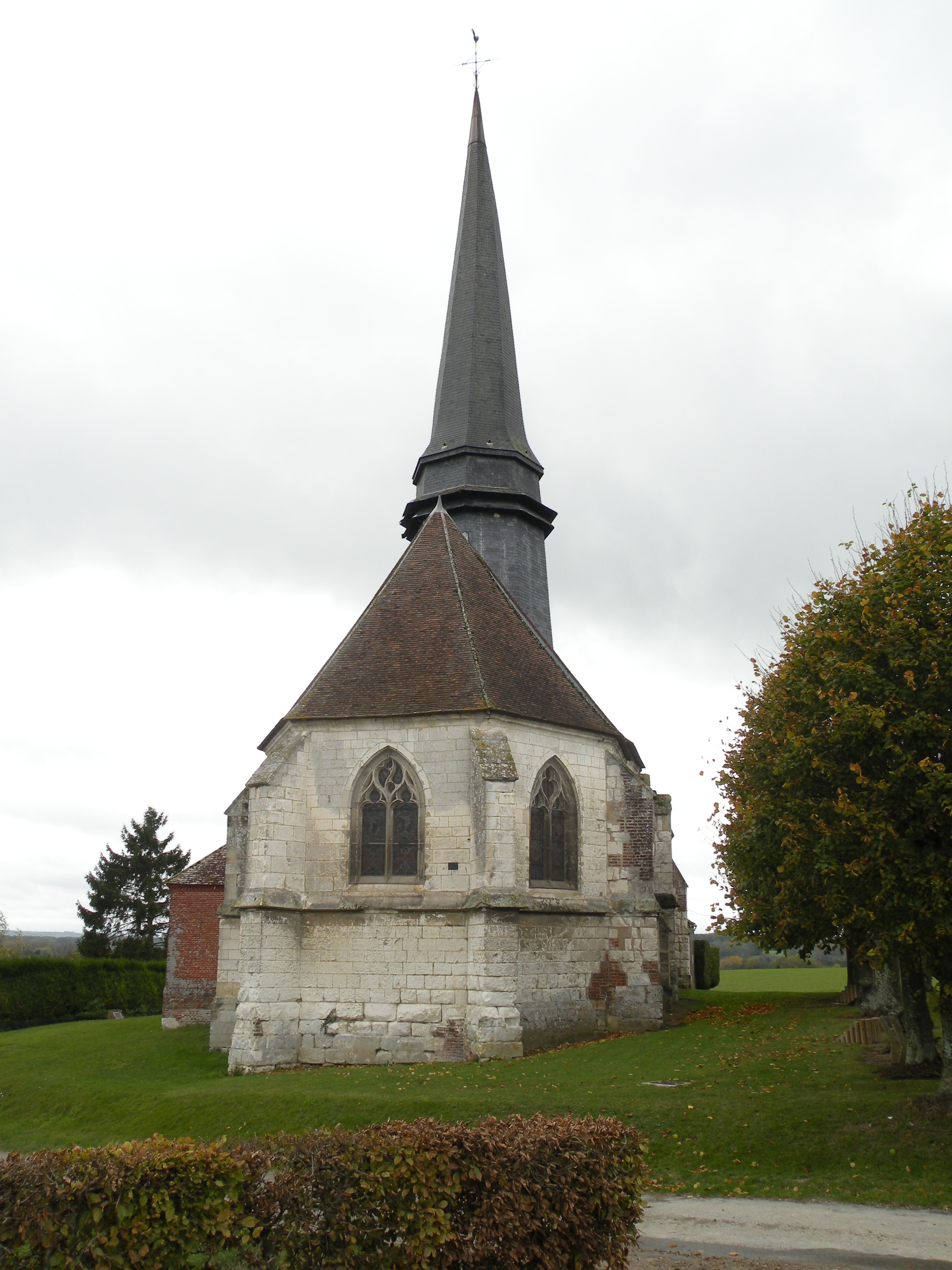 Église de Saint-Martin-le-Nœud à aux-marais